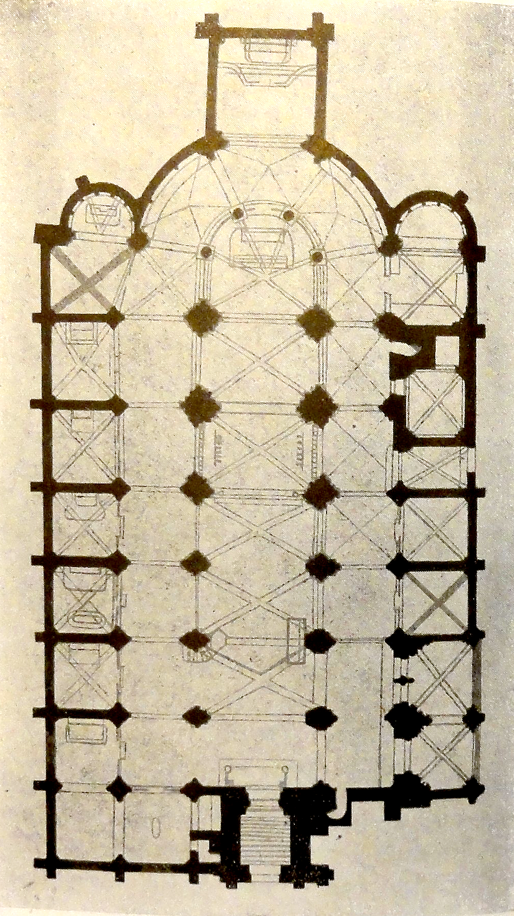 Plan de la collégiale en 1844. La chapelle d'axe carrée a été détruite. La chapelle devant la quatrième travée du bas-côté sud est devenue porche, et la porche et la sacristie jouxtant la cinquième et la sixième travée du bas-côté sud ont été remplacés par une sacristie neuve.